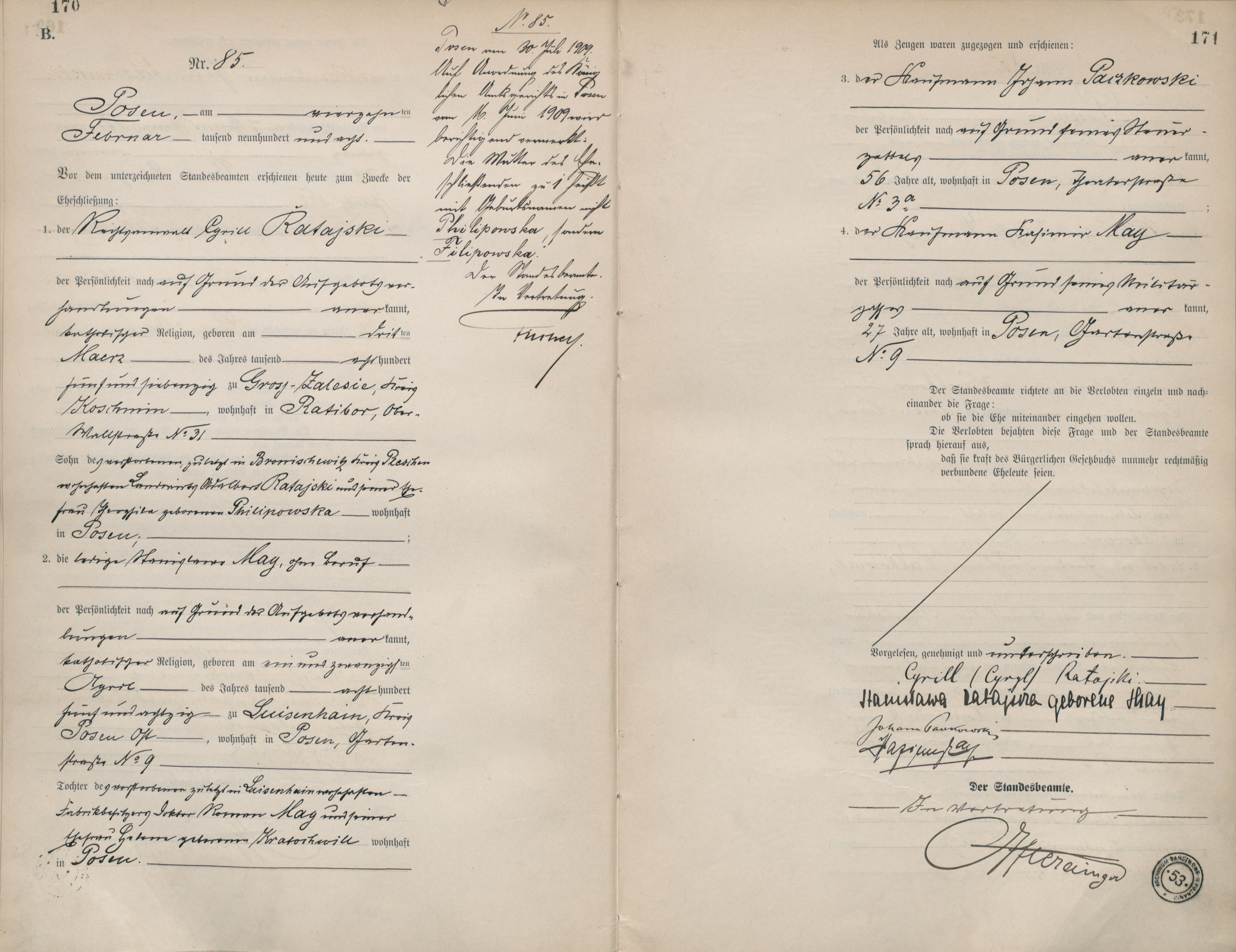 numer 85